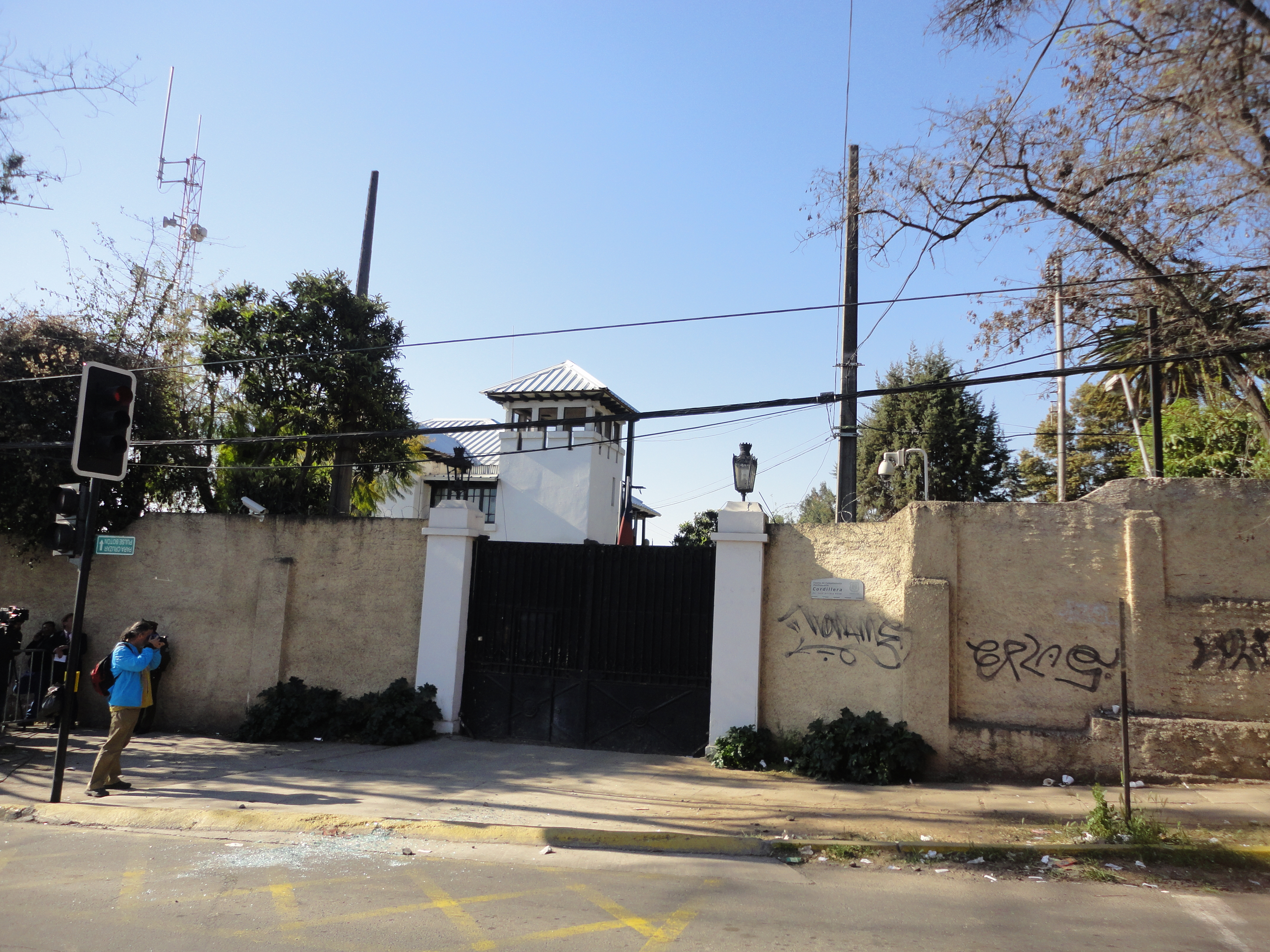 Portón de ingreso principal del Centro de Cumplimiento Penitenciario Cordillera1 más conocido como Penal Cordillera, complejo penitenciario chileno, ubicado en la comuna de Peñalolén, donde estaban detenidos de forma exclusiva, oficiales militares de las Fuerzas Armadas y Carabineros, implicados en violaciones a los Derechos Humanos durante la dictadura militar de Augusto Pinochet. El recinto se encuentra bajo la administración de Gendarmería de Chile.